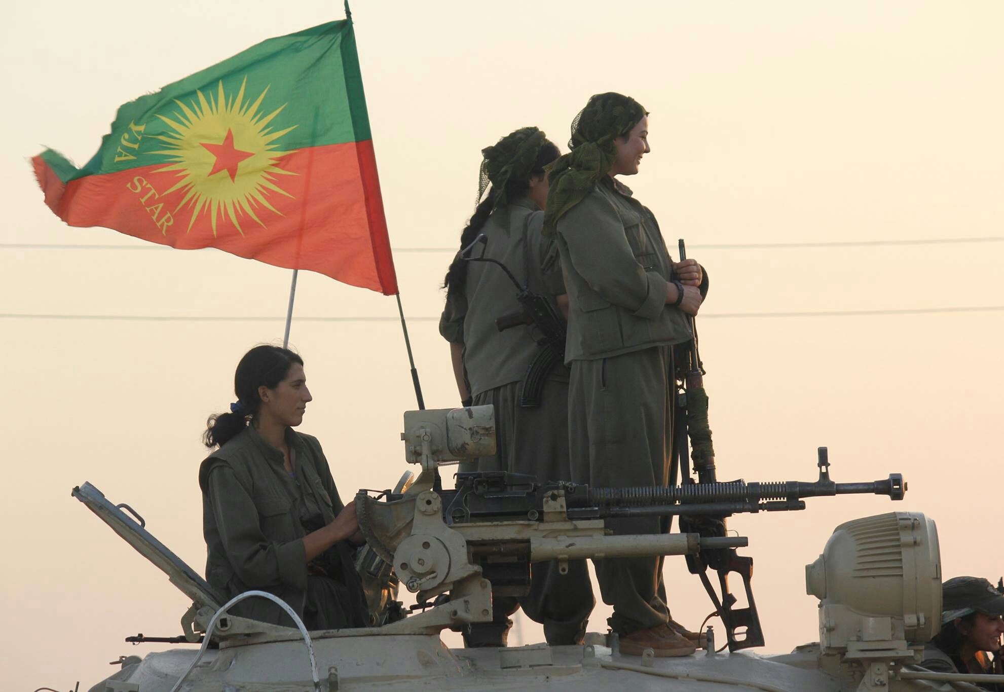 In Shingal YPG